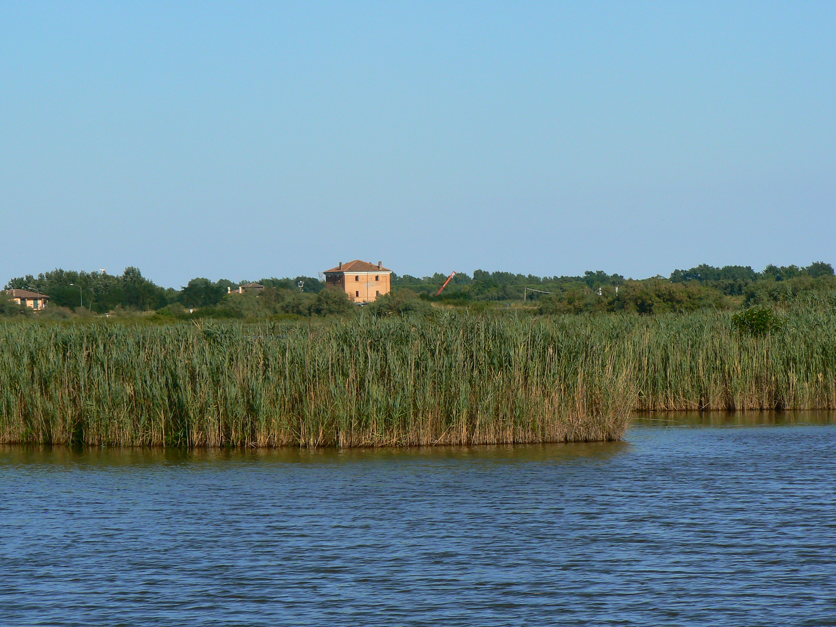 Oasi Canneviè-Porticino-Sullo sfondo la Torre della Finanza (Volano), edificio recentemente restaurato This is a photo of a monument which is part of cultural heritage of Italy.